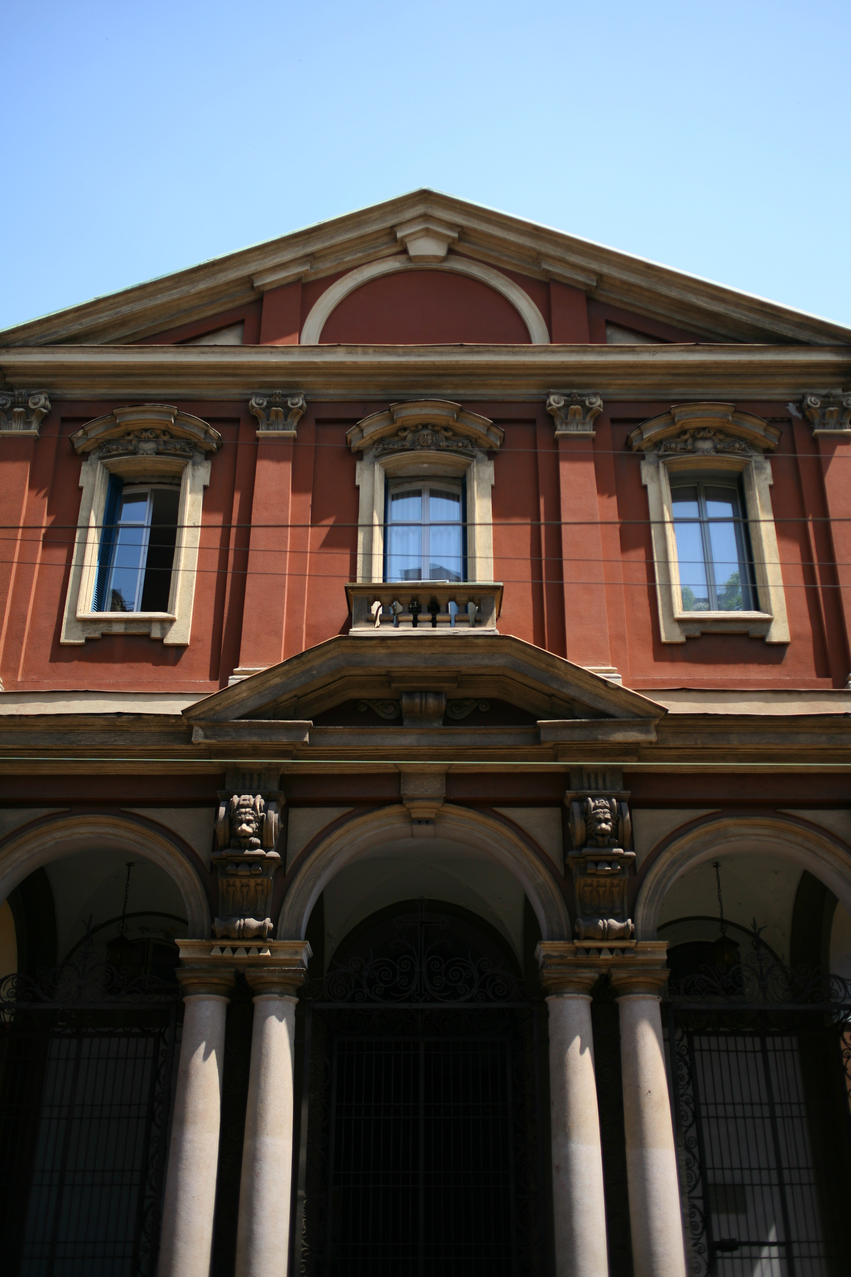 La facciata della demolita Chiesa di San Giovanni Decollato alle Case Rotte a Milano, ricollocata nel 1924 da Paolo Mezzanotte sul fianco destro della chiesa di Santa Maria Segreta sulla via Ariosto.